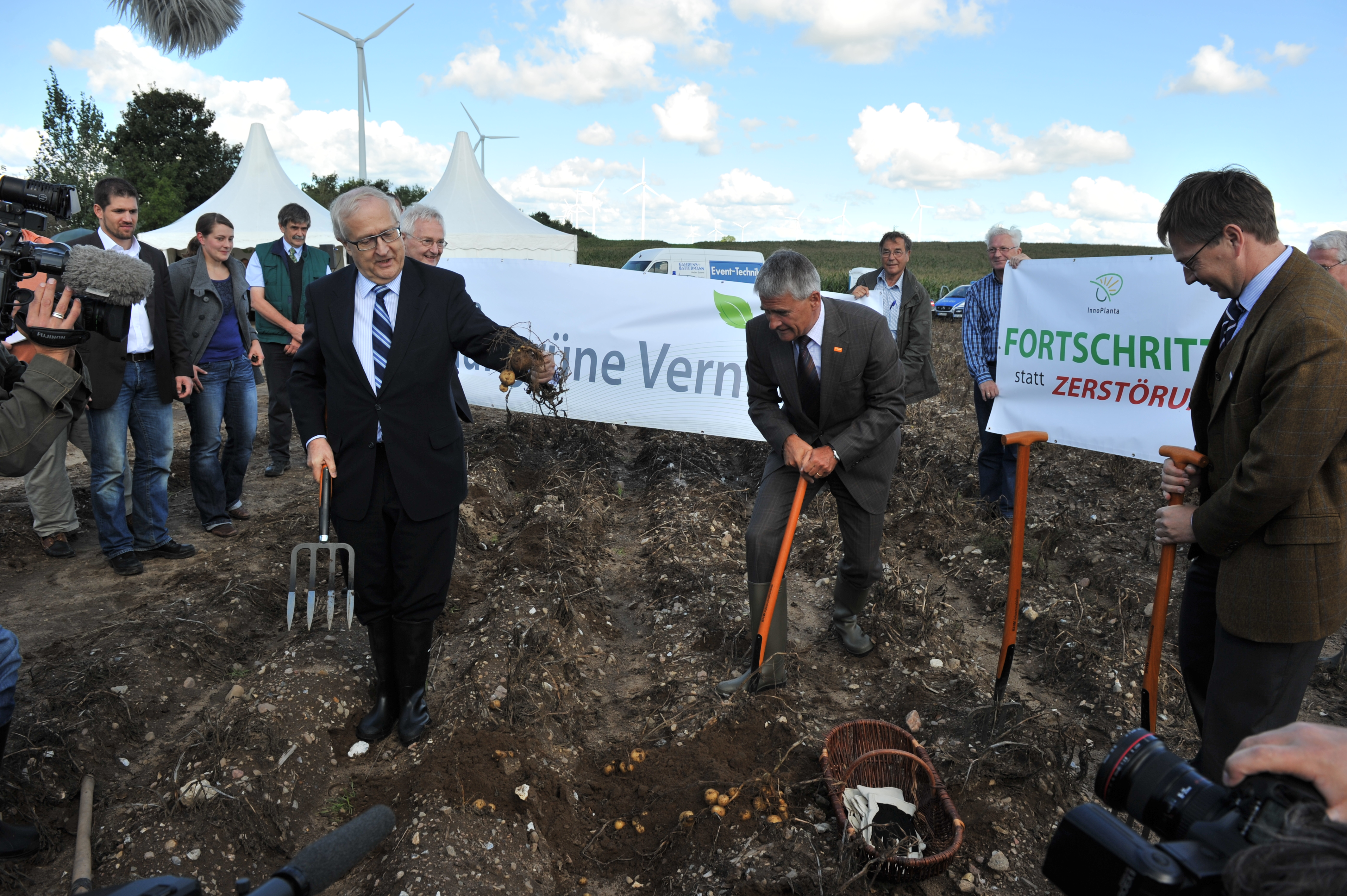 Der Bundesminister für Wirtschaft und Technologie Rainer Brüderle startete Ende August die Amflora-Ernte in Zepkow, Mecklenburg-Vorpommern. Zusammen mit dem BASF-Vorstandsvorsitzenden Dr. Jürgen Hambrecht und dem für die Pflanzenbiotechnologie zuständigen Vorstandsmitglied Dr. Stefan Marcinowski holte er die ersten Knollen der gentechnisch verbesserten Stärkekartoffeln aus der Erde.